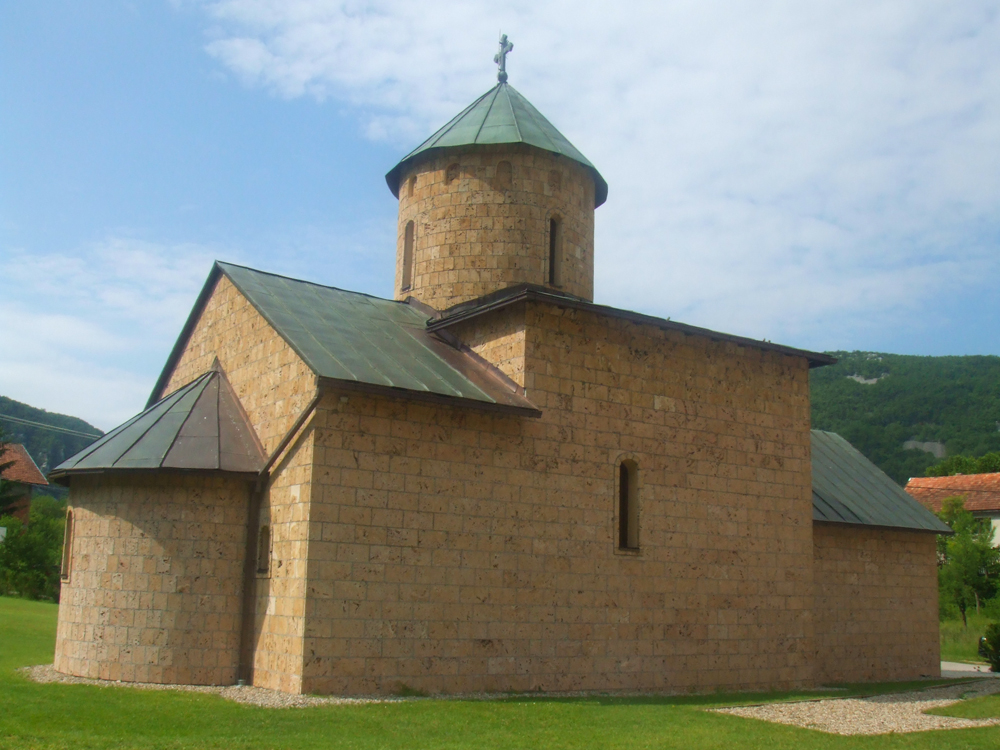 Манастир Рмањ (Мартин Брод)